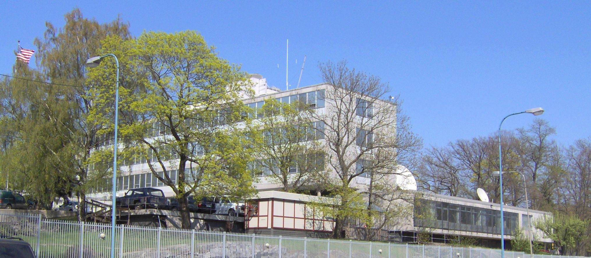 Amerikanska ambassaden i Stockholm American Embassy in Stockholm, Sweden. 2006